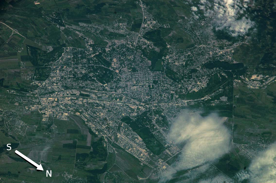 Satelliten-Aufnahme Chișinău, Moldawien nachträglich bearbeitet durch Perconte andere Versionen: Satelliten-Aufnahme Chişinău-Airport Photographs are not protected by copyright unless noted. If copyrighted, permission should be obtained from the copyright owner prior to use. If not copyrighted, photographs may be reproduced and distributed without further permission from NASA. If a recognizable person appears in the photograph, use for commercial purposes may infringe a right of privacy or publicity and permission should be obtained from the recognizable person. Originalbild